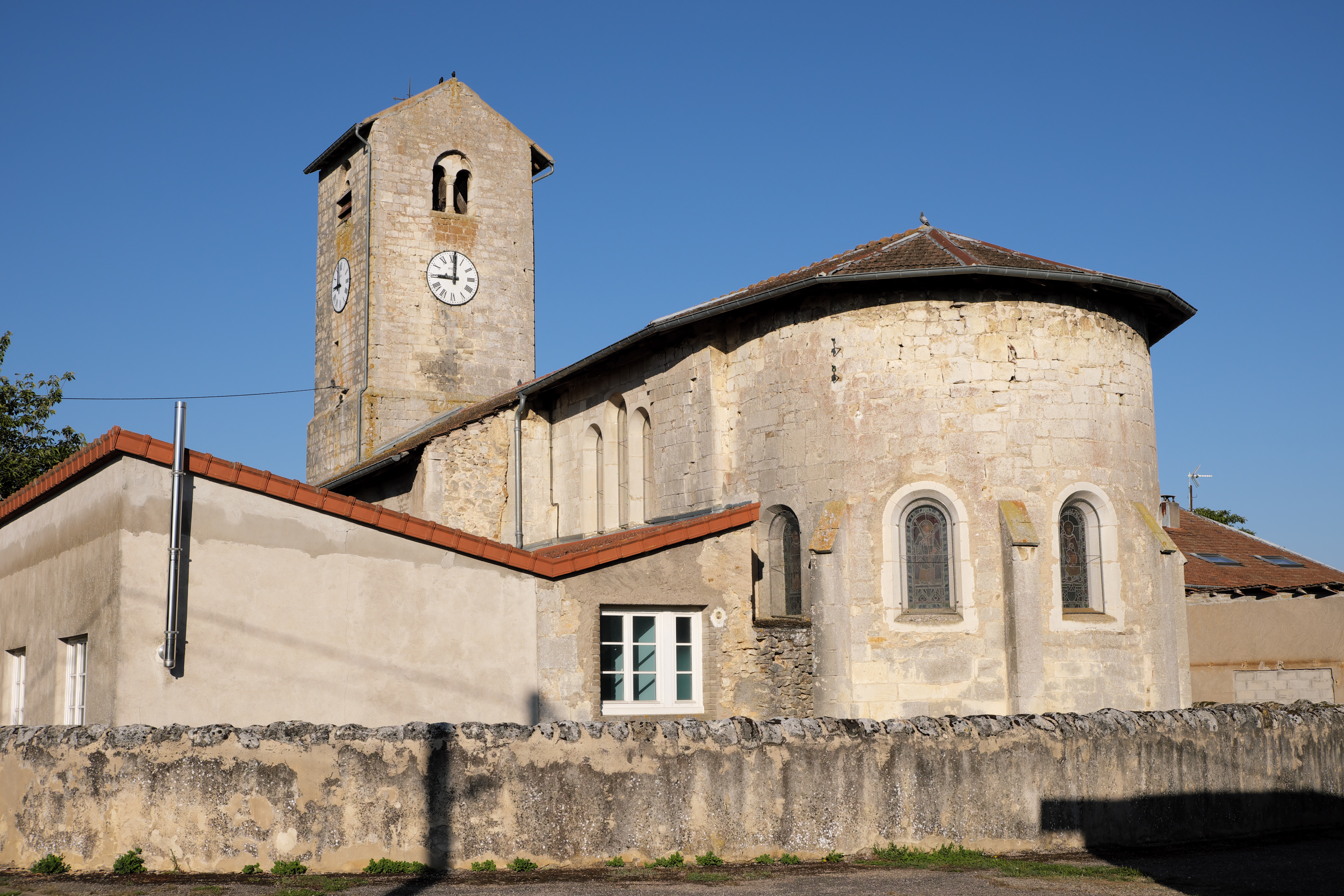 Abside romane de l'église Saint-Rémy de Puxe à Lalœuf en Meurthe-et-Moselle. .